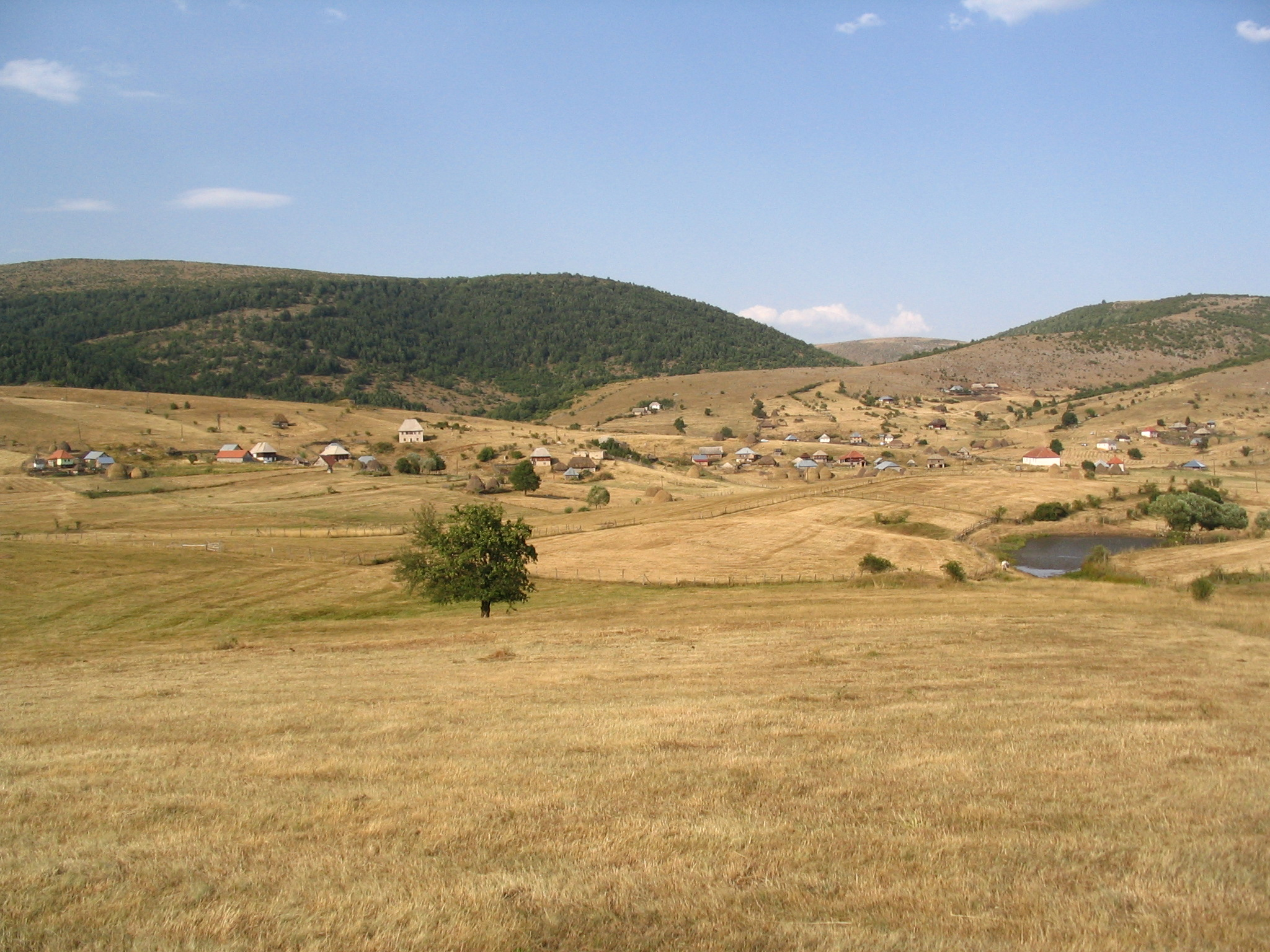 Црвско, општина Сјеница.